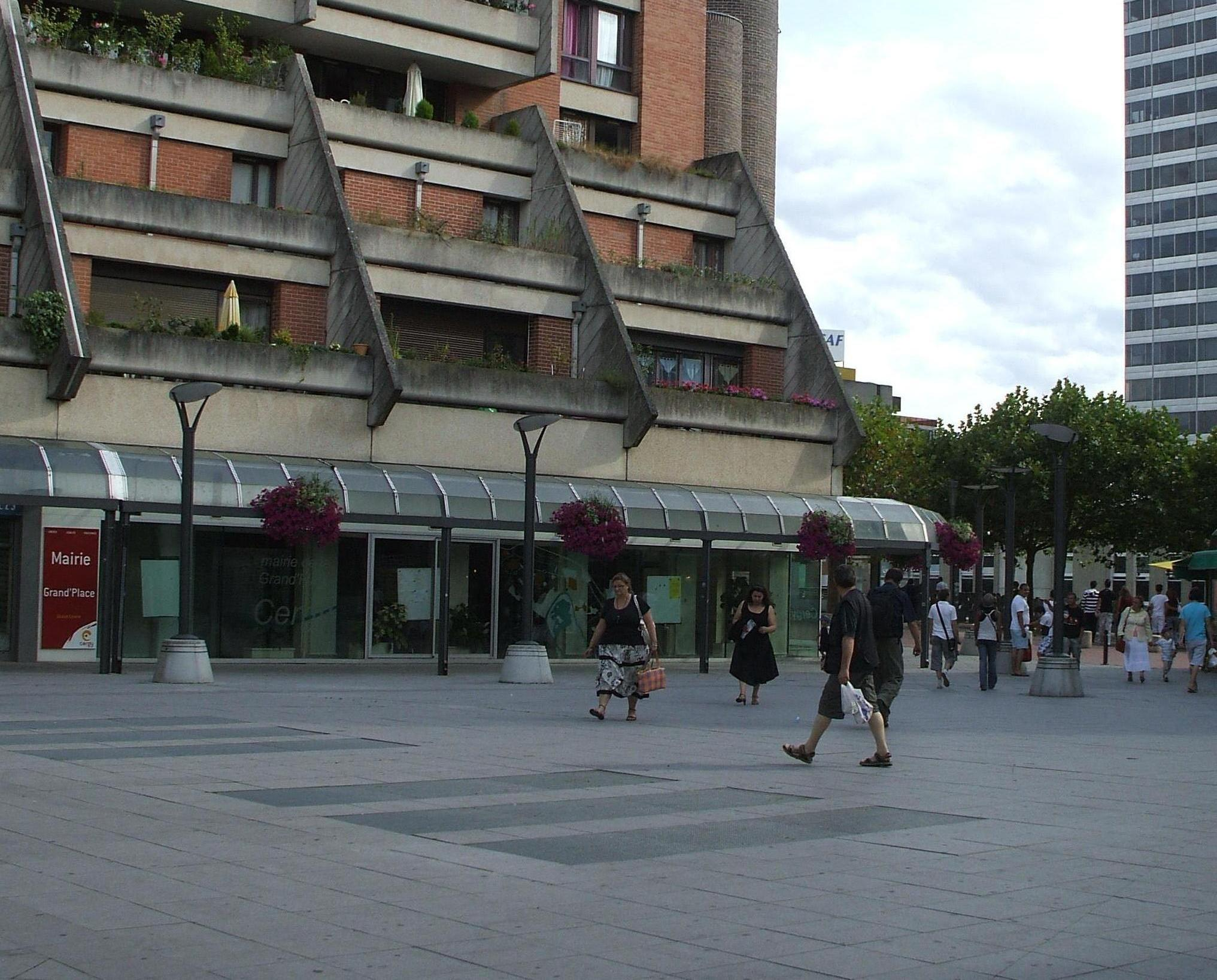 Mairie annexe de cergy val d'oise france